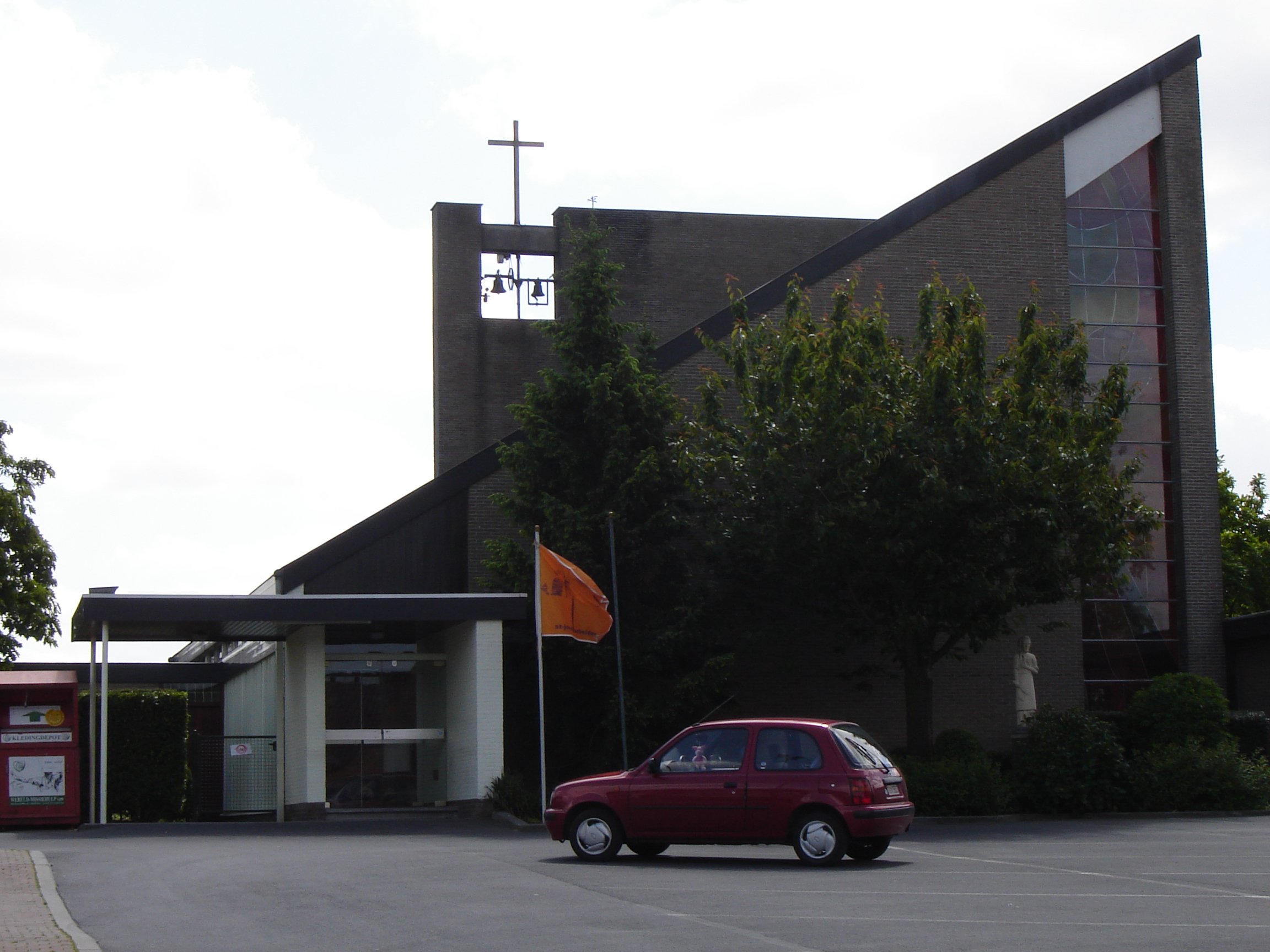 Kerk van Sint-Jozef-Arbeider in gehucht De Driekoningen in Torhout Church of Saint Joseph in the hamlet De Driekoningen in Torhout, West Flanders, Belgium